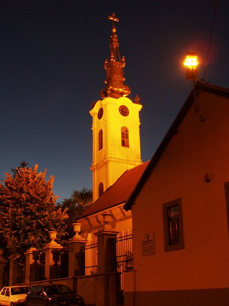 Nikolajevska crkva u Zemunu snimljena u sumrak, autor fotografije:Nicolo